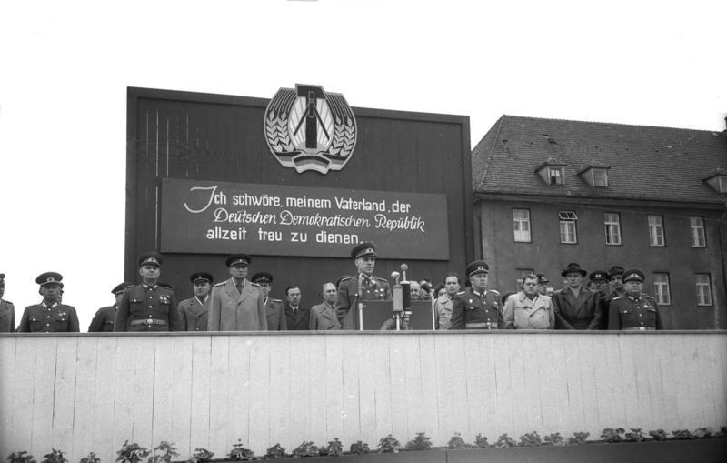 Zentralbild/Heilig, 30.4.1956 Erstes Regiment der Nationalen Volksarmee leistete Schwur - Regimentsfahne durch Minister für Nationale Verteidigung übergeben. Soldaten und Offiziere des ersten Regiments der ersten Division der Nationalen Volksarmee leisteten am 30.4.1956 den Schwur auf die Heimat. Das Regiment, der erste Verband der Nationalen Volksarmee überhaupt erhielt aus der Hand des Ministers für Nationale Verteidigung, Generaloberst Willi Stoph, die Regimentsfahne. UBz: Generaloberst Willi Stoph bei seiner Ansprache.